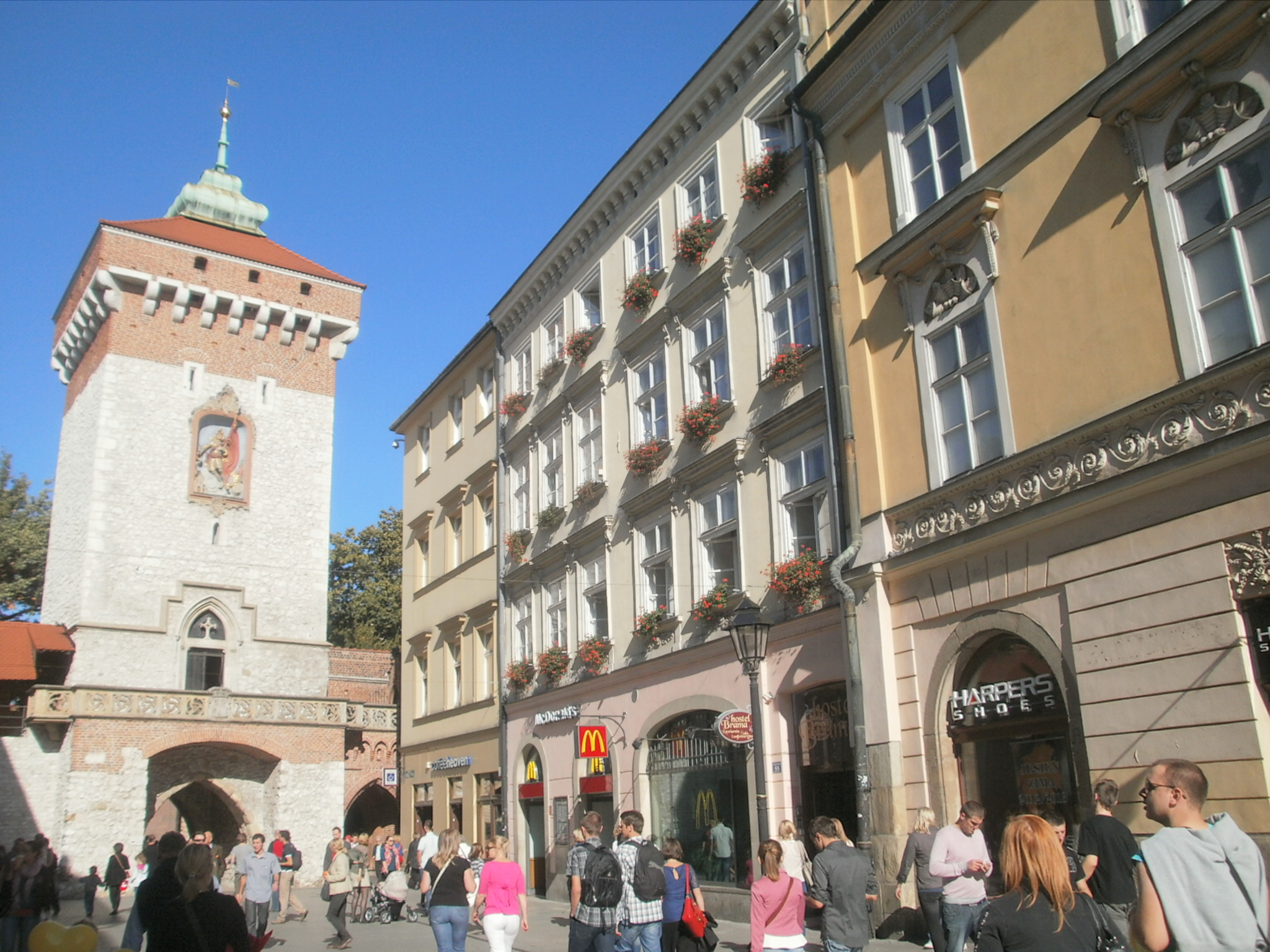 Kamienica z oficyną. Kraków, ul. Floriańska 55.